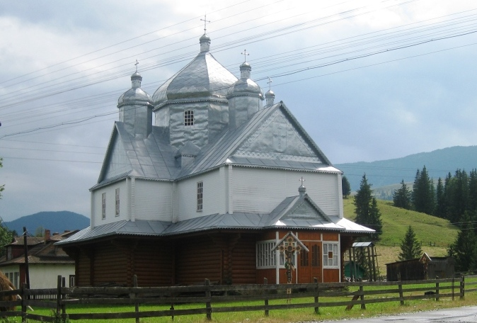 Церква в селі Стаїще